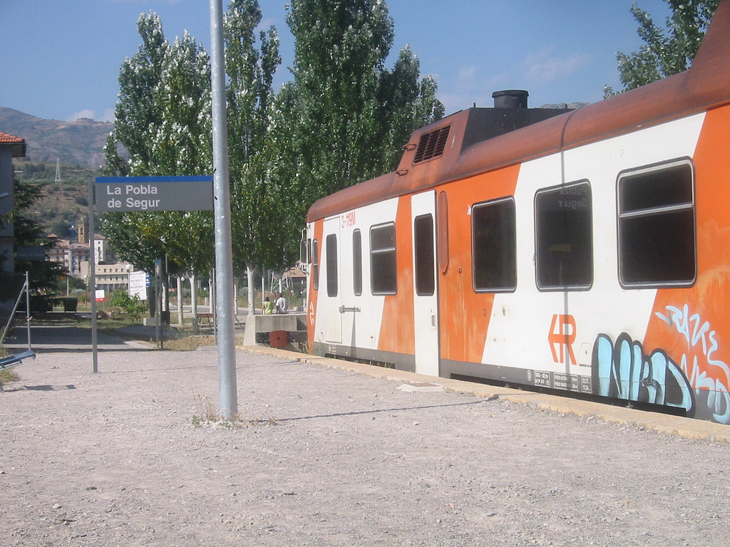 Location: La Pobla de Segur, Spain